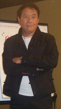 Robert Kiyosaki